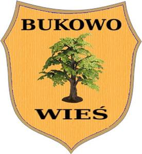 Nieoficjalny Herb.